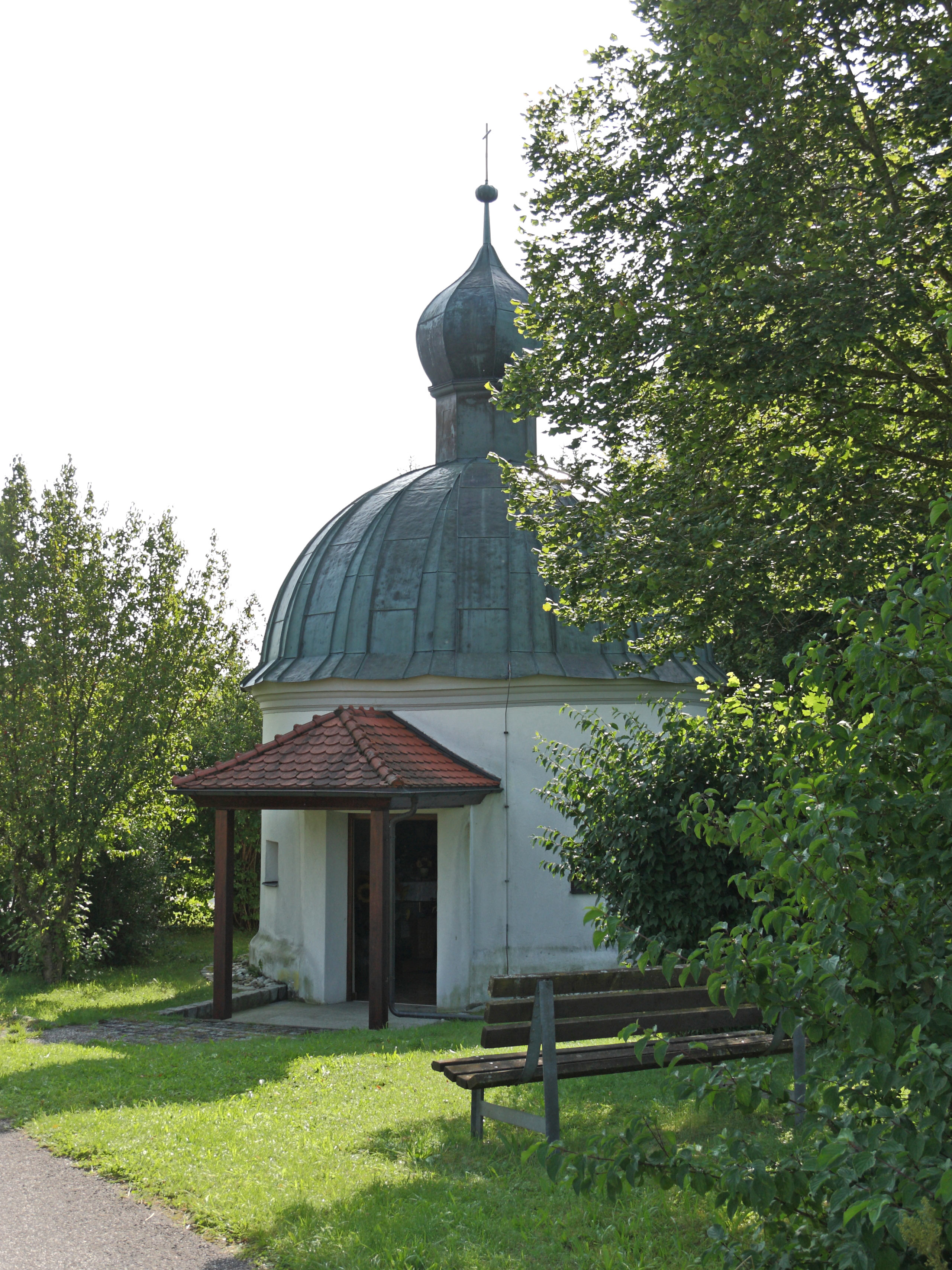 Kath. Kapelle Maria Trost in Behlingen, Gemeinde Kammeltal; Ansicht der 1699 erbauten Kapelle von Nordwesten mit Eingang